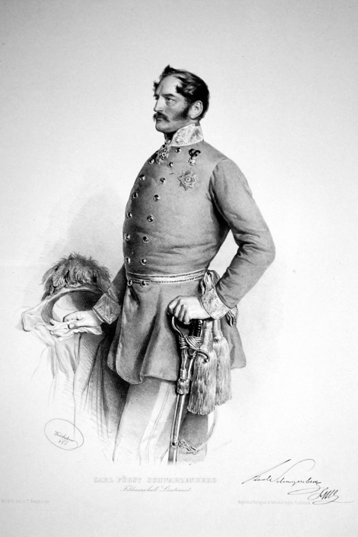 Karl II. Fürst zu Schwarzenberg (1802-1857), FZM, Vliesritter. Lithographie von Josef Kriehuber, 1850